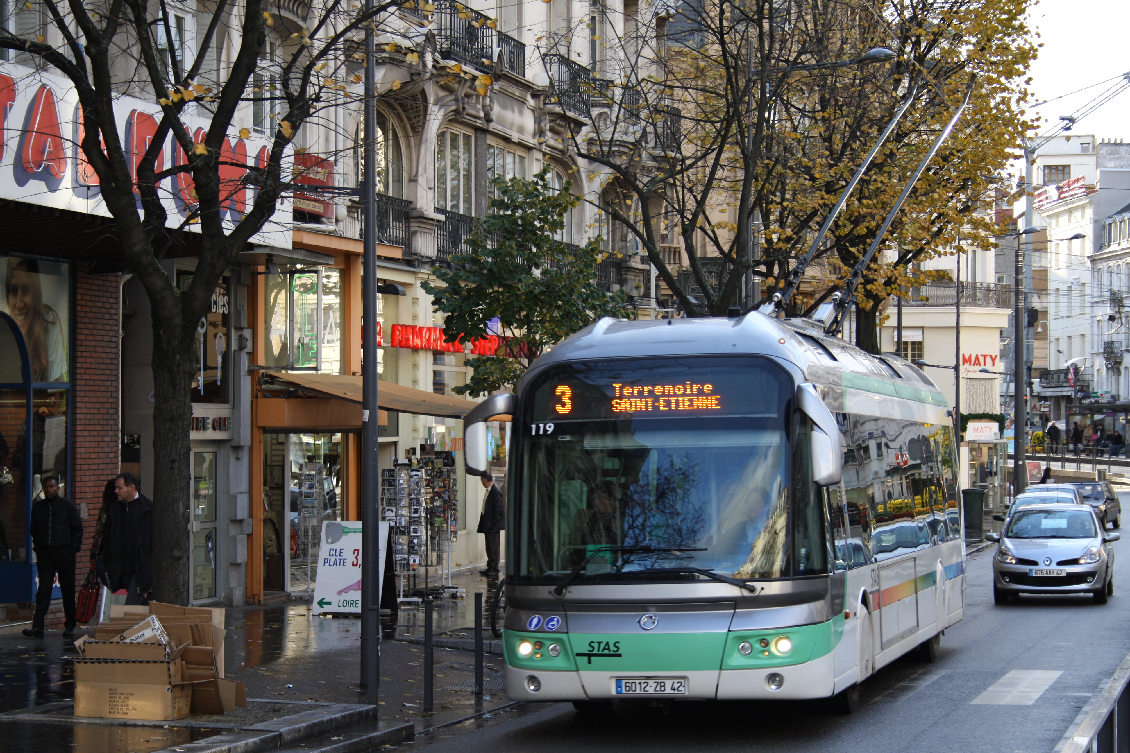 Oberleitungsbus in Saint-Étienne